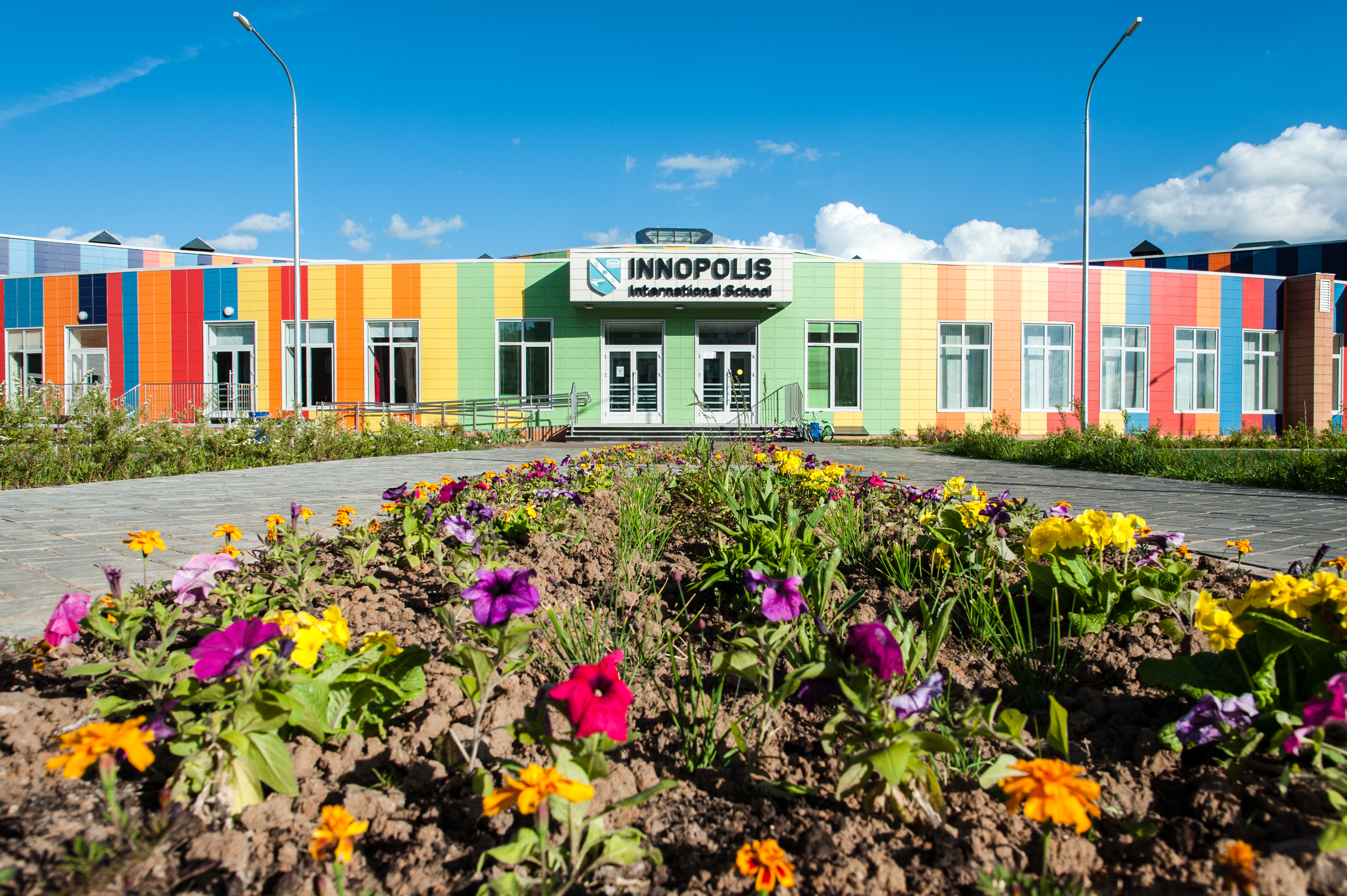 Международная школа Иннополис дошкольное отделение